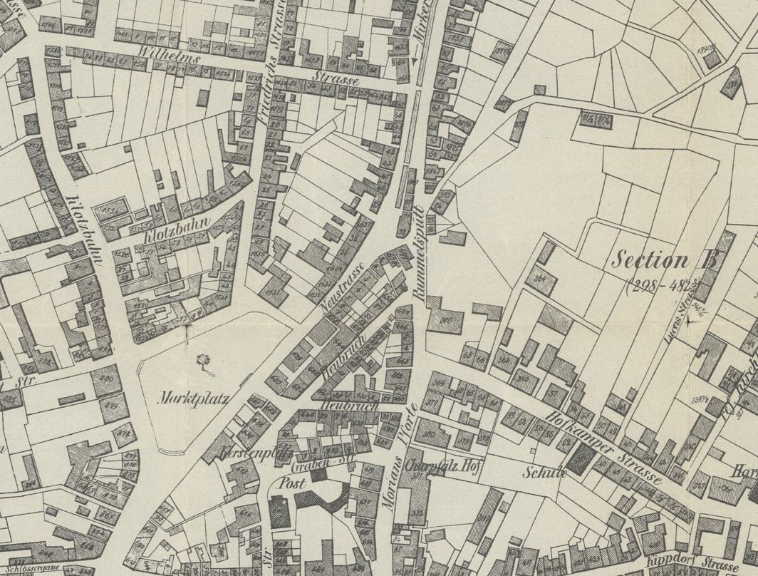 Der Neumarkt. Kartauschnitt aus dem Elberfelder Grundplan aus 1849